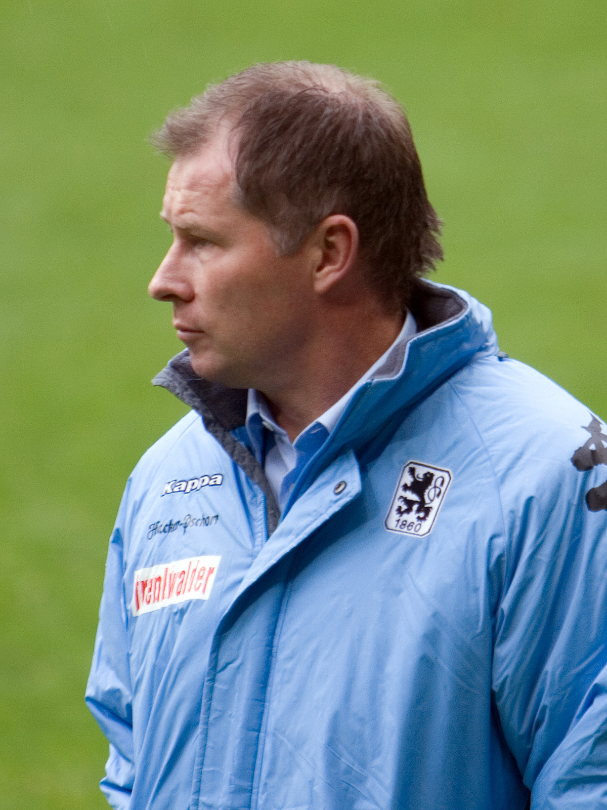 Stefan Reuter, game 1860 - Fürth, Allianz Arena